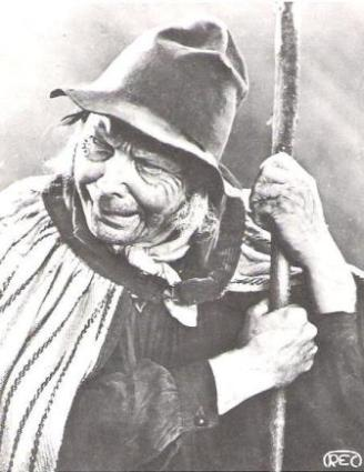 Jean-Louis Boncoeur